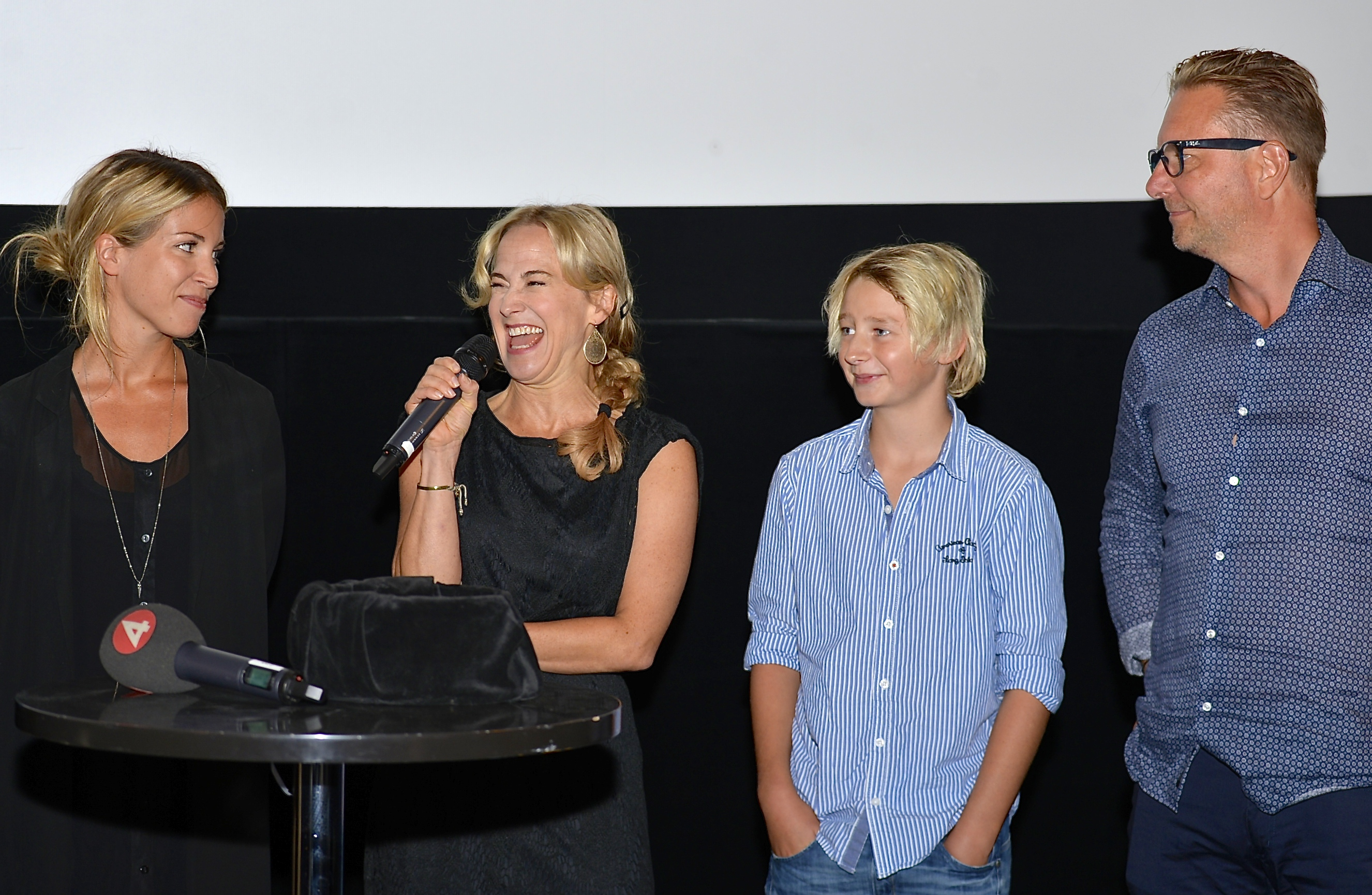 Presentationen av Sune i fjällen Filmhuset i Stockholm den 18 augusti 2014.